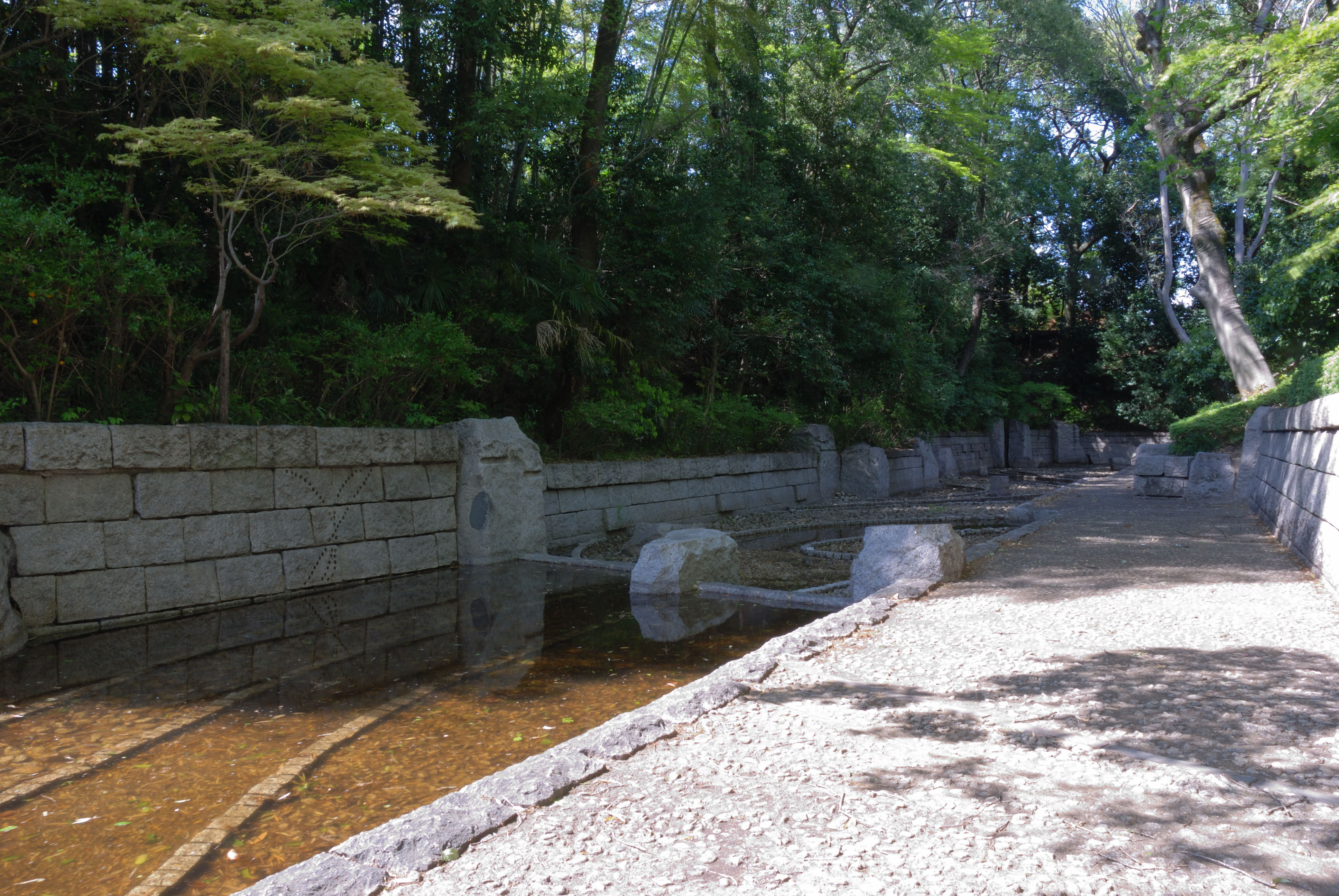 Suwakuruwa dorui, hori